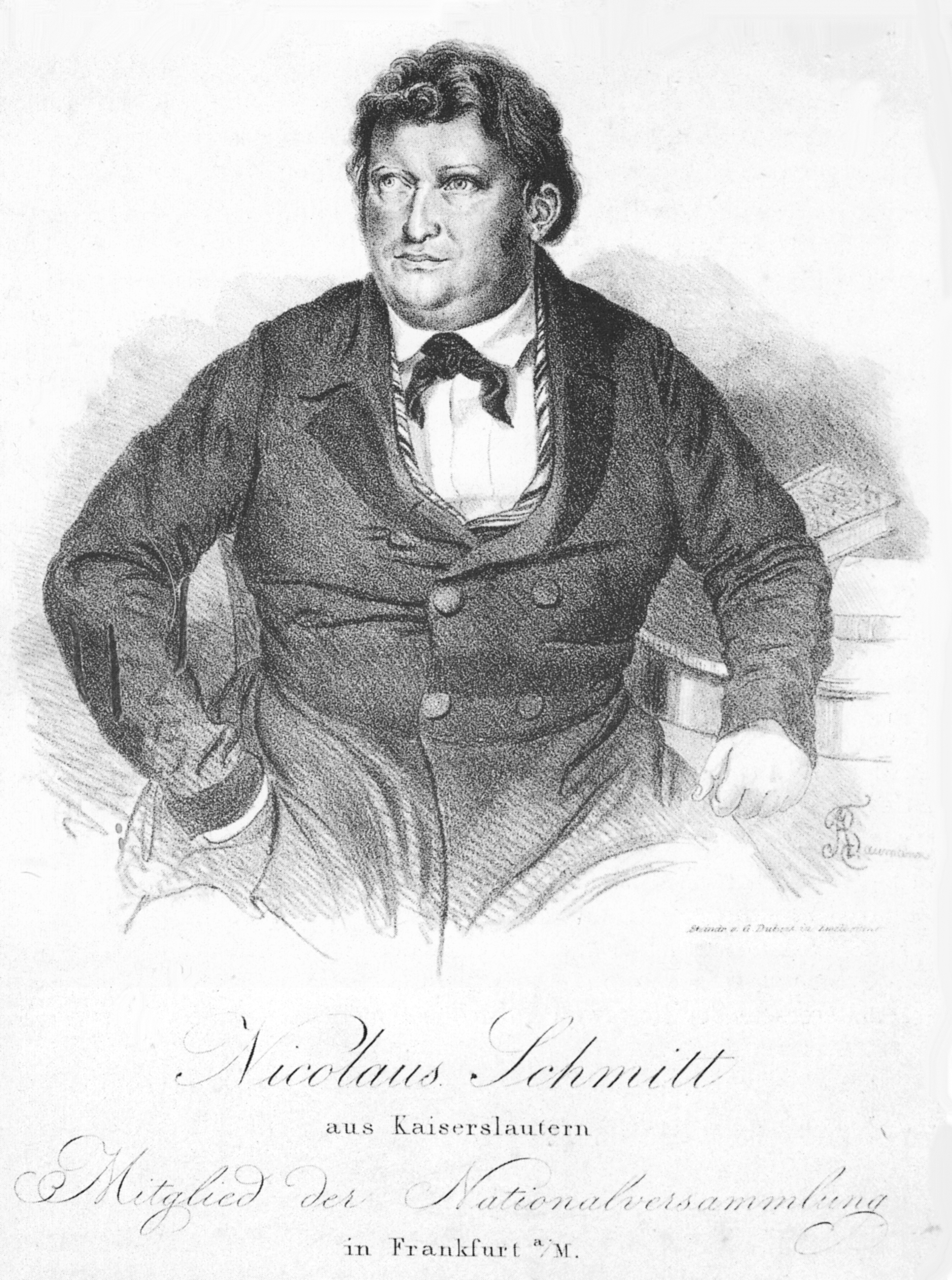 Nicolaus Schmitt